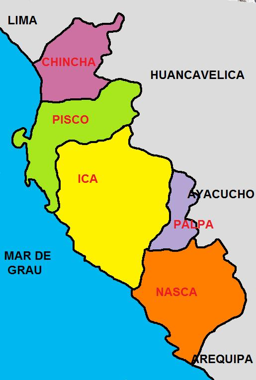 Imagen que muestra la División Politica del Departamento de Ica, una de las 25 circunscripciones en que se divide el Perú